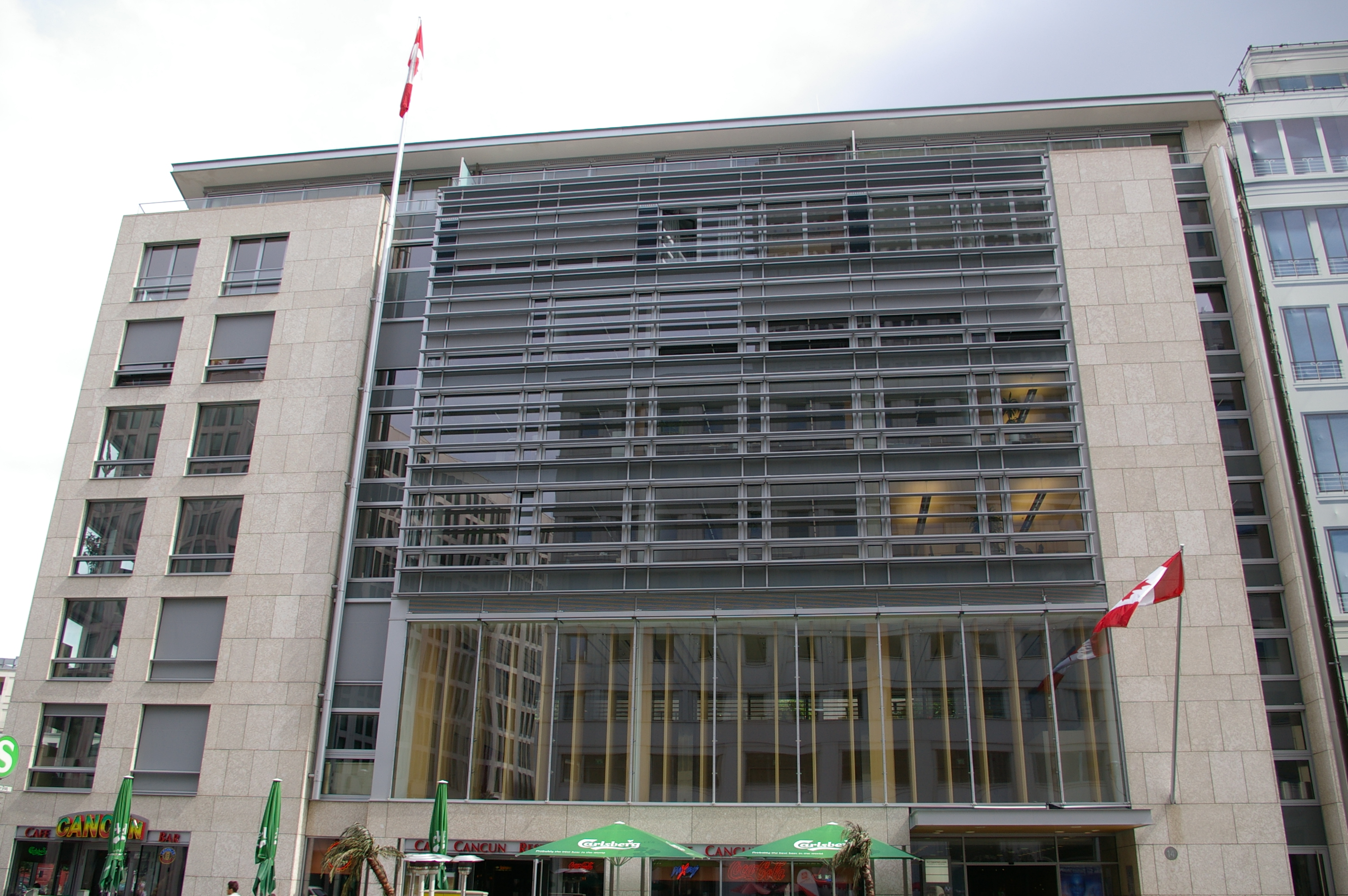 Canadian Embassy